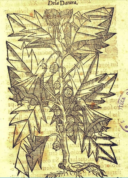 Cristobal de Acosta, Tractado de las Drogas p. 85: Datura